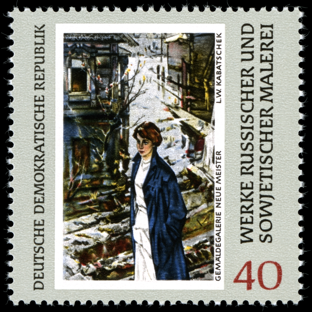 Stamp description / Briefmarkenbeschreibung Artist: Leonid Wassiljewitsch Kabatschek Ausgabepreis: 40 Pfennig First Day of Issue / Erstausgabetag: 10. Dezember 1969 Auflage: 5.000.000 Entwurf: Naumann und Dutschendorf Druckverfahren: Rastertiefdruck Michel-Katalog-Nr: Ländercode-MiNr: 1532